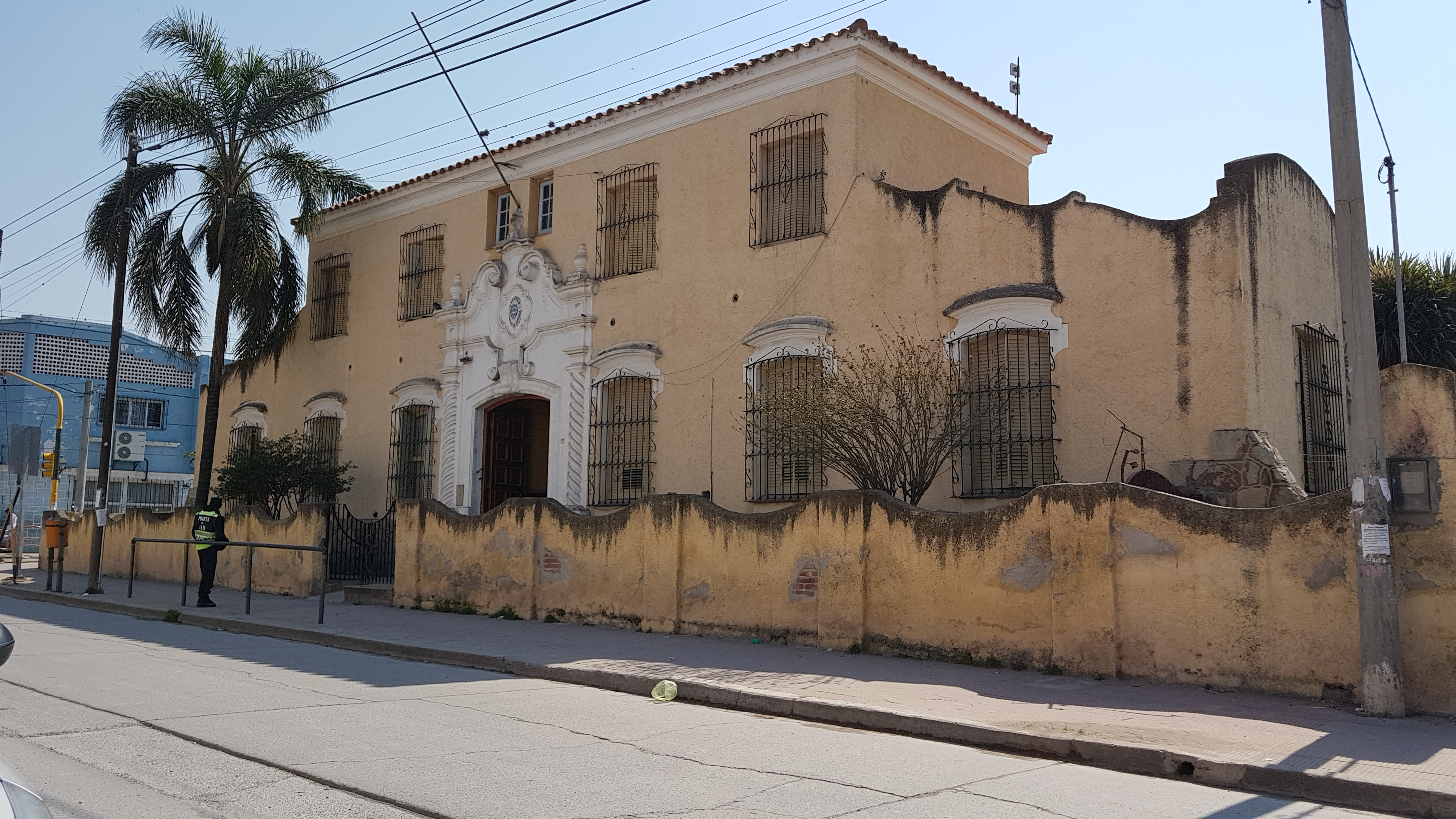 Escuela de enseñanza primaria pública, ocupa casi la cuarta parte de una manzana, tiene 3 turnos y también funciona como BESPA.fachada de escuela